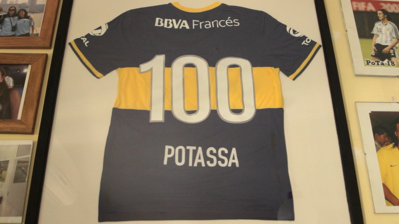 María Belén Potassa es una futbolista argentina que juega en el Club Deportivo UAI Urquiza de la Primera División Femenina de Argentina. Jugó en Rosario Central,​ San Lorenzo de Almagro​, Santiago Morning​ de Chile y Boca Juniors. Lleva más de 300 goles en su carrera y desde el año 2006 forma parte del plantel de la Selección Argentina La imagen corresponde al rodaje del Documental "Posición adelantada. Historias de otro fútbol" realizado por el #DCMTeam en el año 2017.